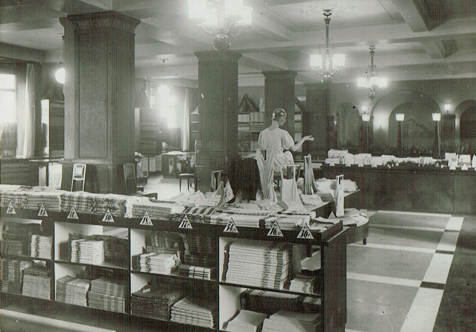 Turun Vanu 1933 II kerros